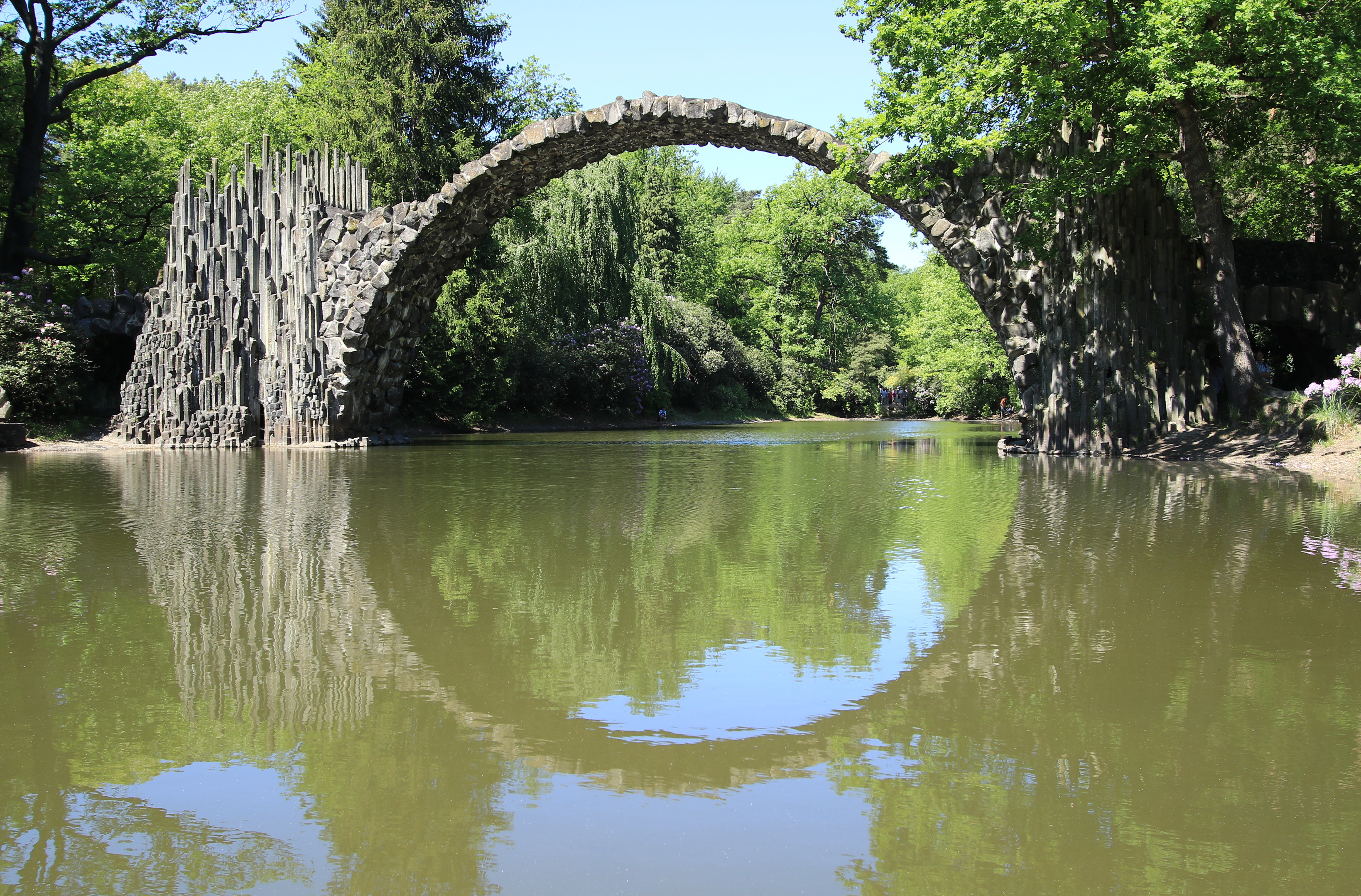 Rakotzbrücke im Azaleen- und Rhododendronpark Kromlau. Diese Datei zeigt das sächsische Kulturdenkmal mit der ID 09303000